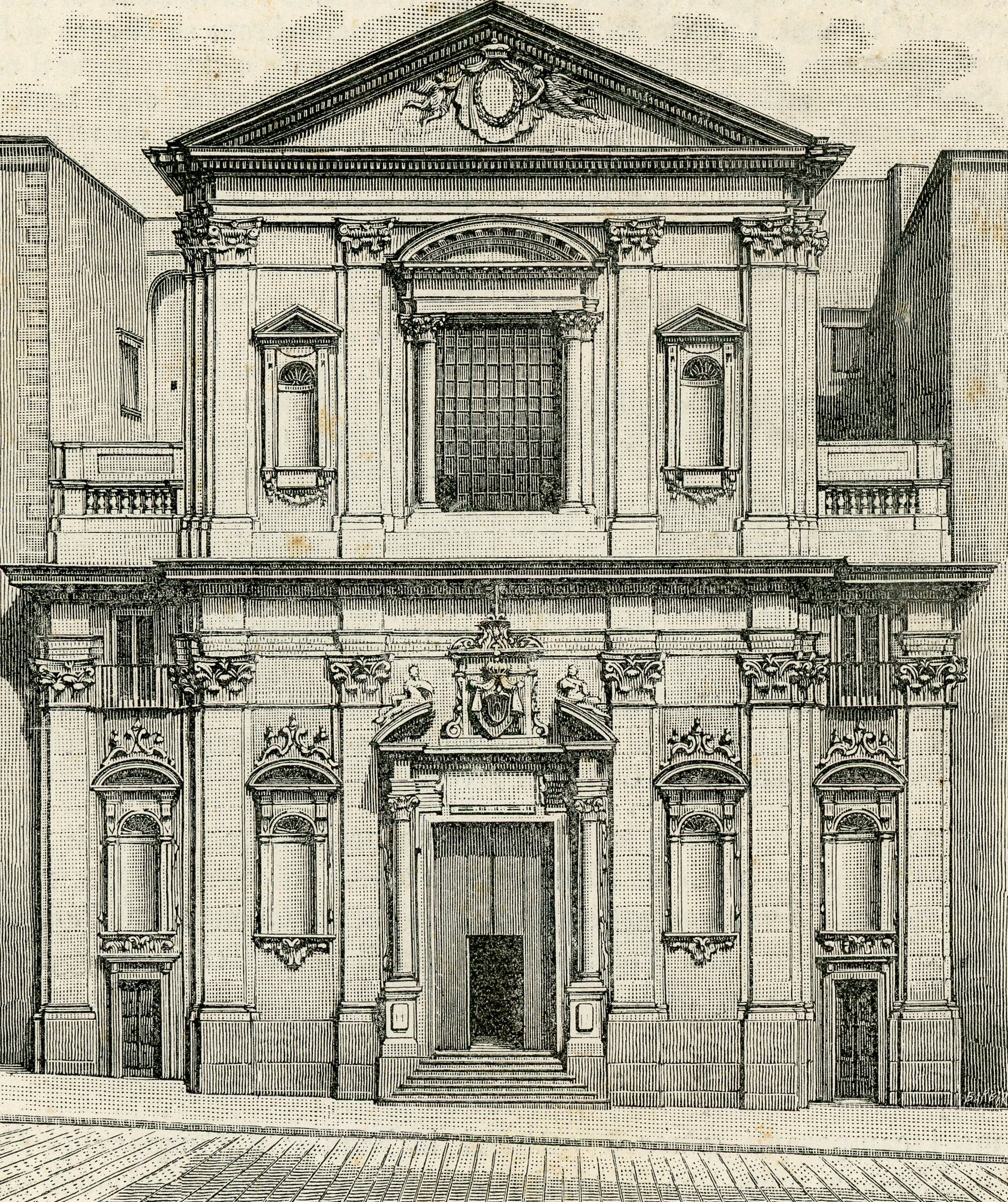 Napoli: chiesa di San Ferdinando (xilografia di Giuseppe Barberis).